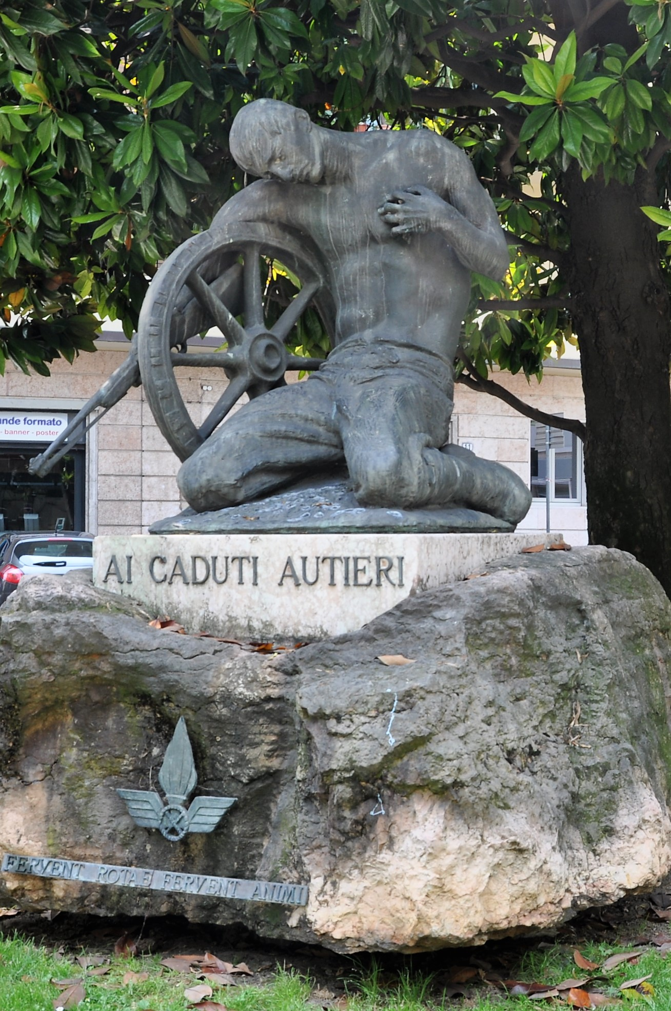 monumento agli Autieri This is a photo of a monument which is part of cultural heritage of Italy.